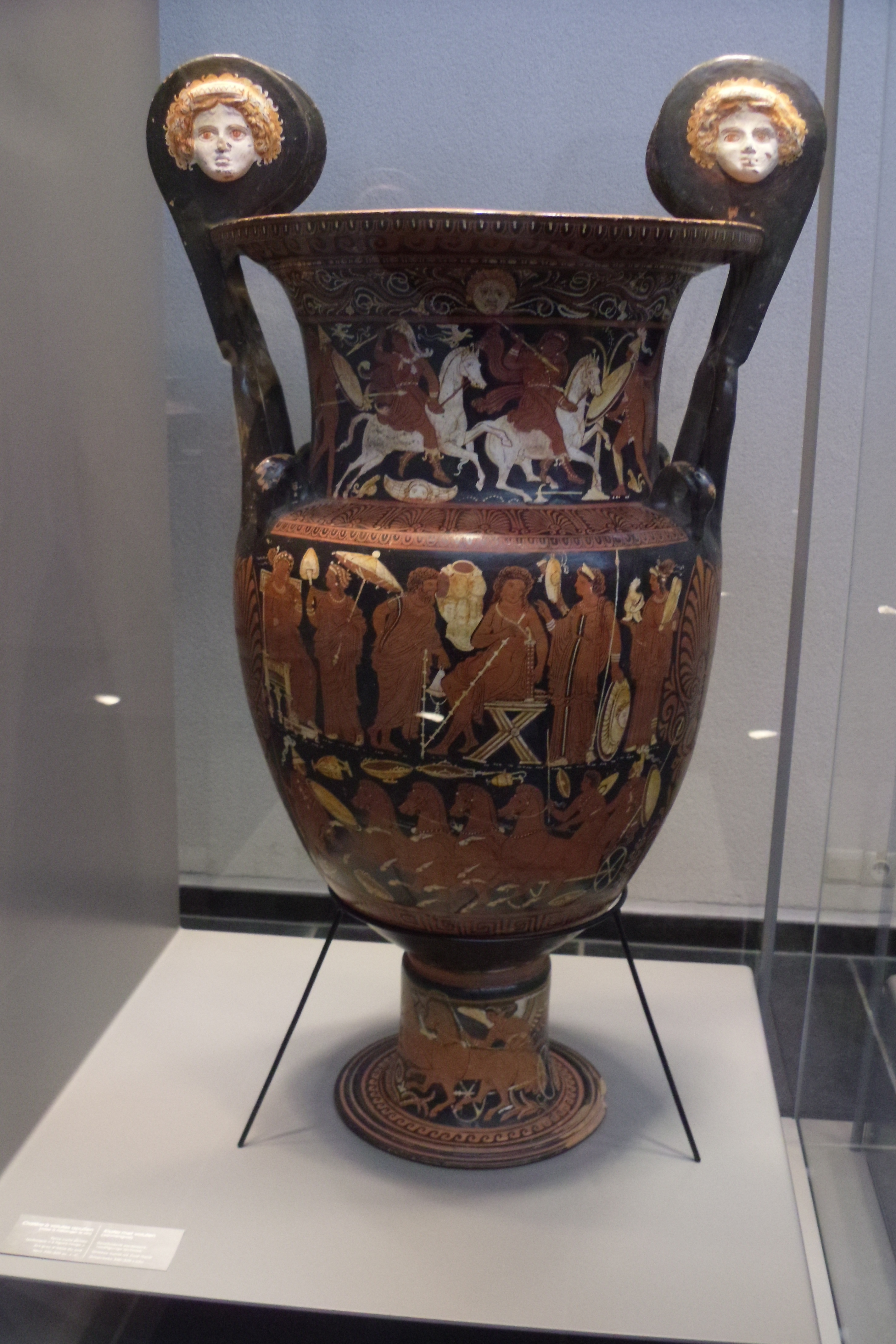 Cratère à volutes apulien. Terre cuite peinte (technique "à figures rouges"). Art grec d'Italie du Sud. Vers 330 - 320 av. J.-C. This is a file created at the museum: Musée royal de Mariemont in Morlanwelz